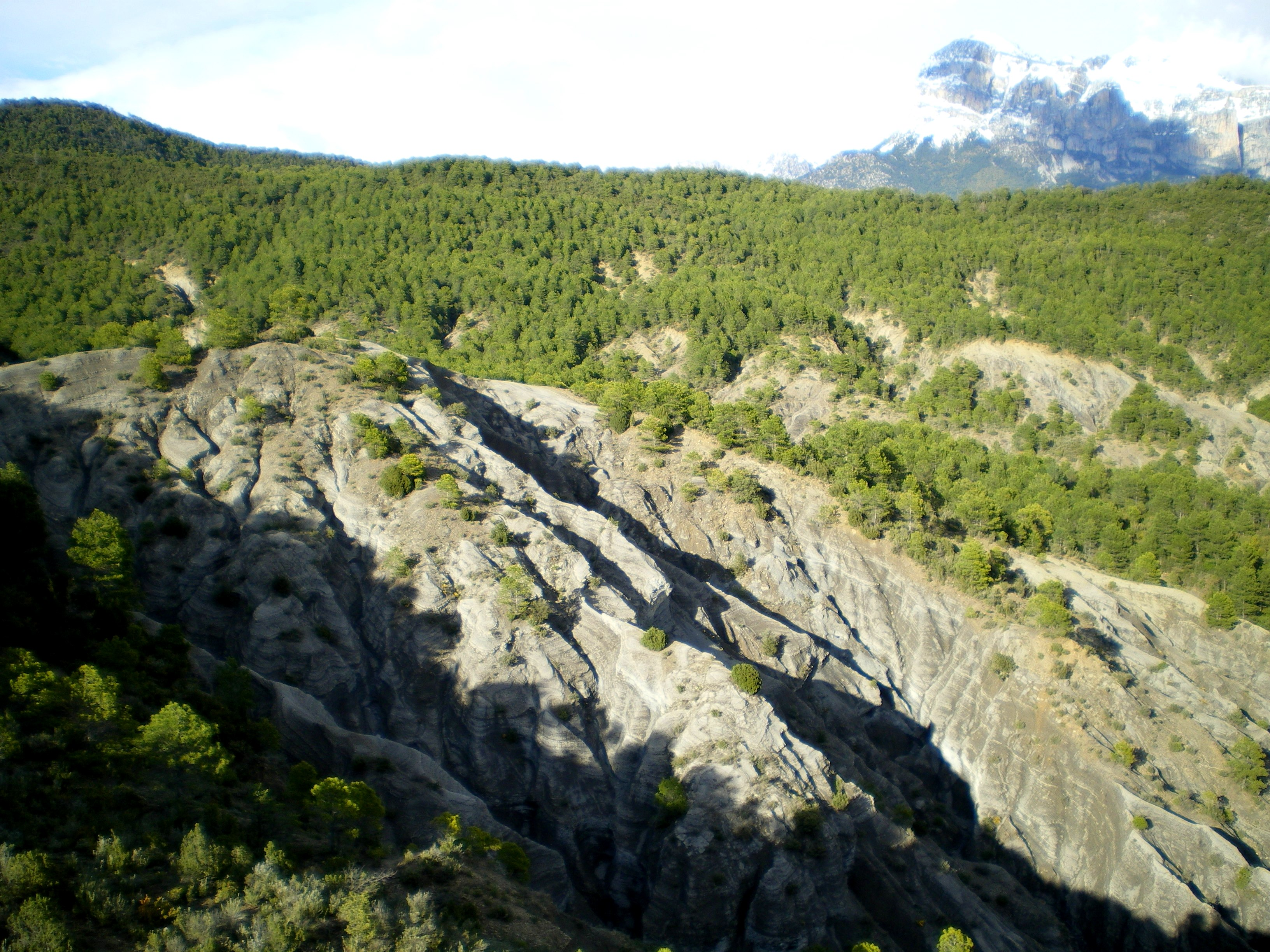 Afloramiento de terreros en el término municipal de Labuerda (Sobrarbe, Huesca)